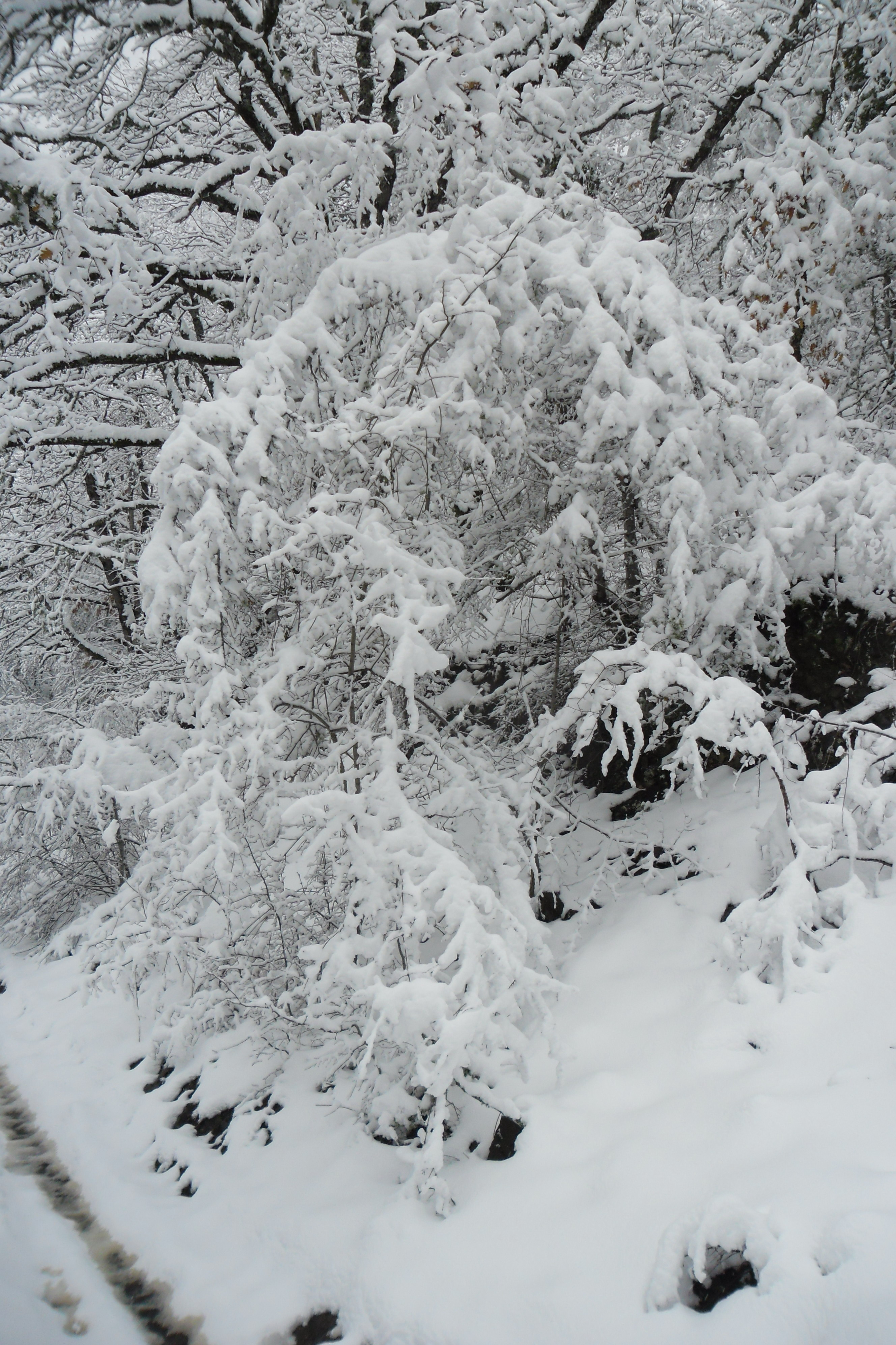 Фото